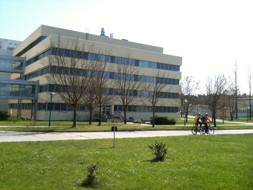 Krankenhaus, Markendorf, Frankfurt (Oder)